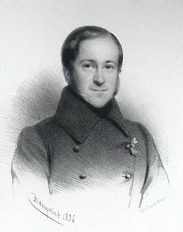 Charles Vilain XIIII, ministre belge